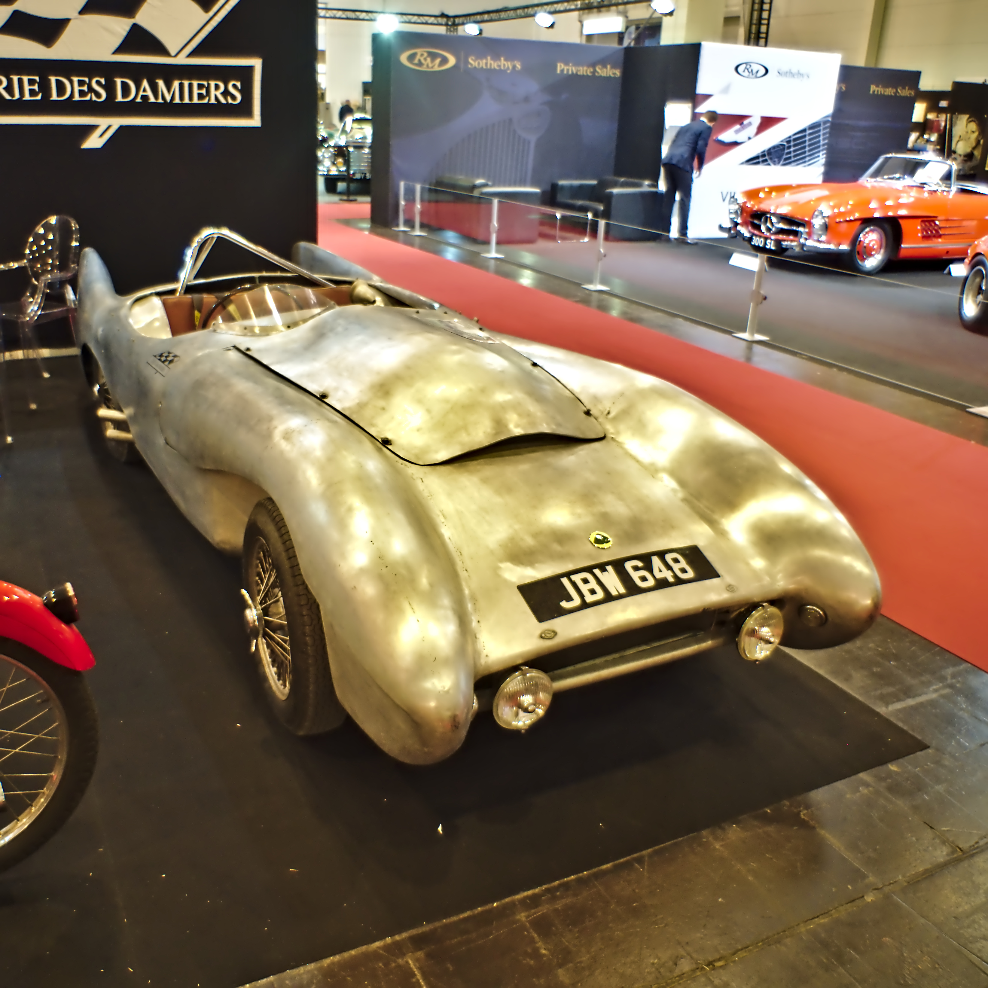 Techno Classica 2019